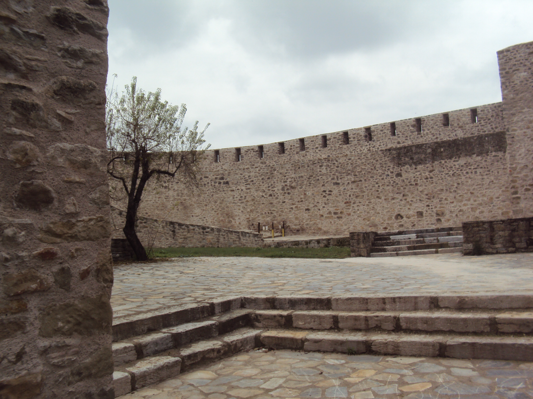 Βυζαντινό Κάστρο Τρικάλων, παλιά πόλη Βαρούσι«Βυζαντινό Κάστρο Τρικάλων, παλιά πόλη Βαρούσι»